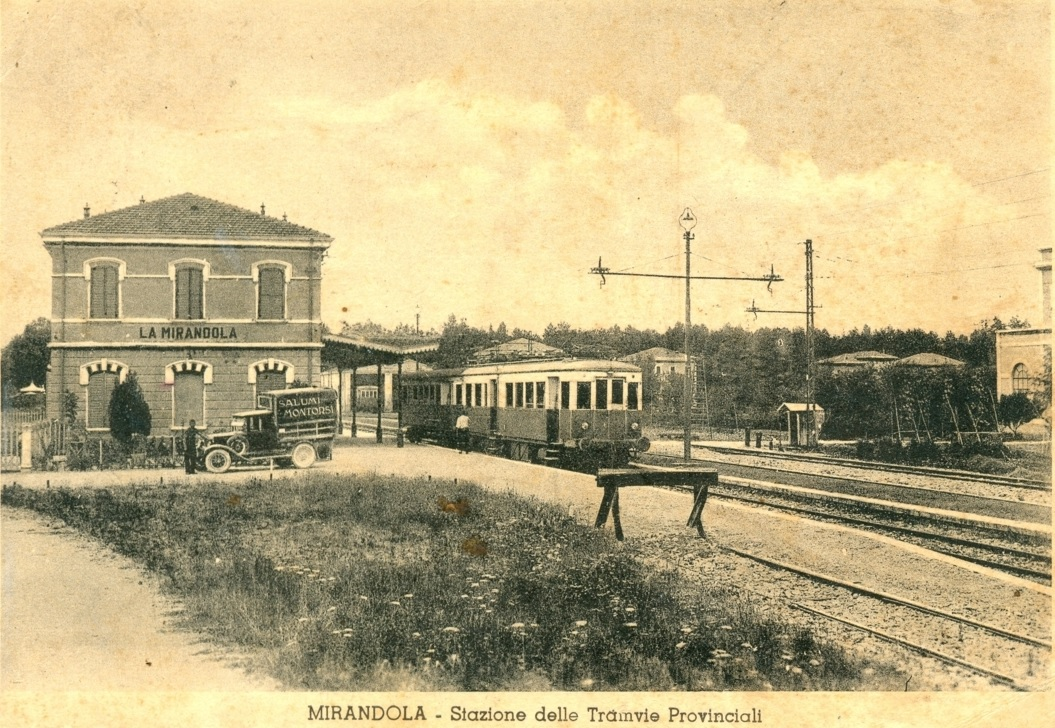 Mirandola - Stazione delle Tramvie Provinciali